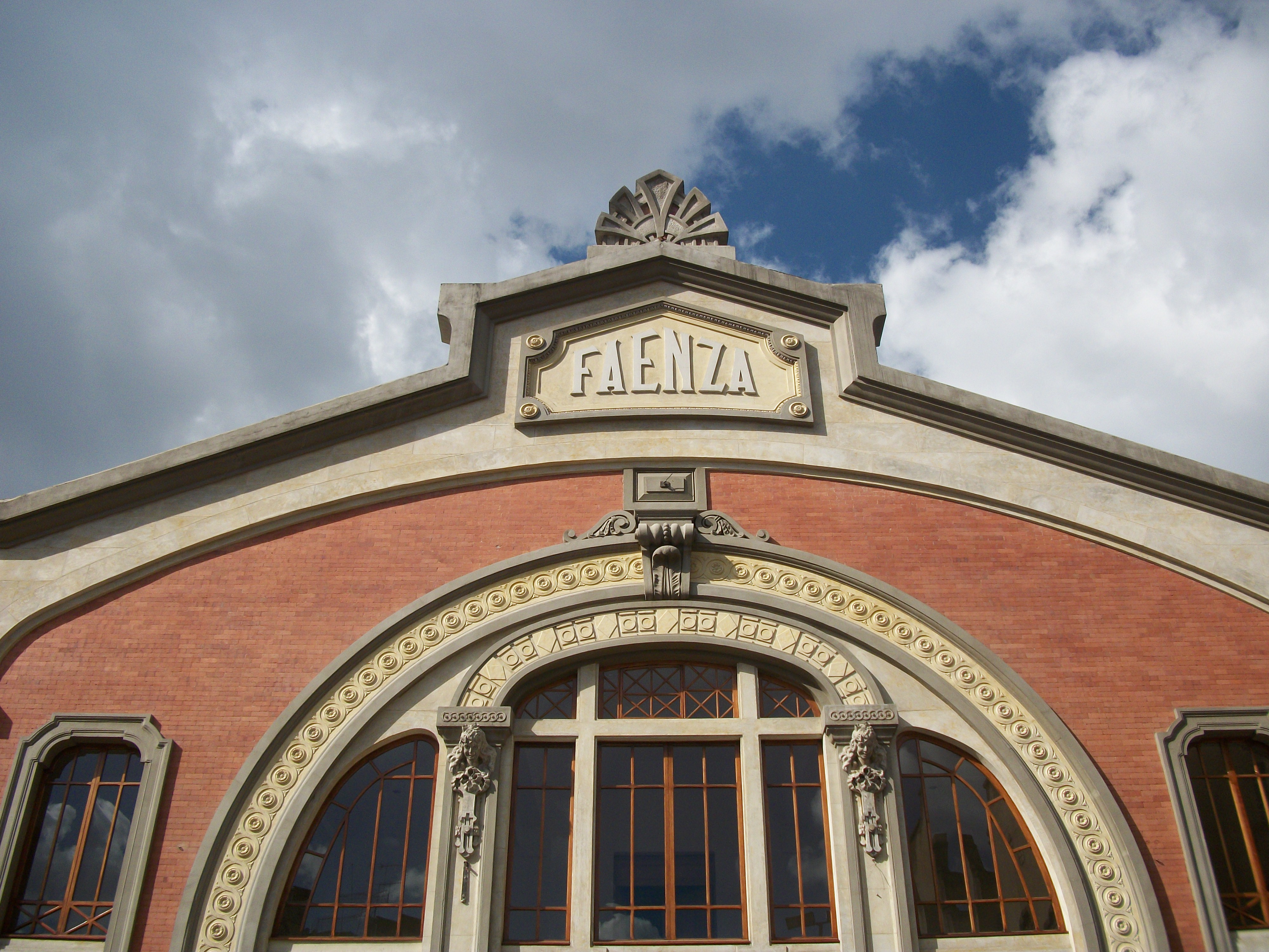 Teatro Faenza en Bogotá.